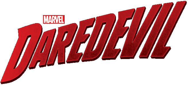 Logo de la série Marvel Daredevil qui sera diffusée sur Netflix en Avril 2015.